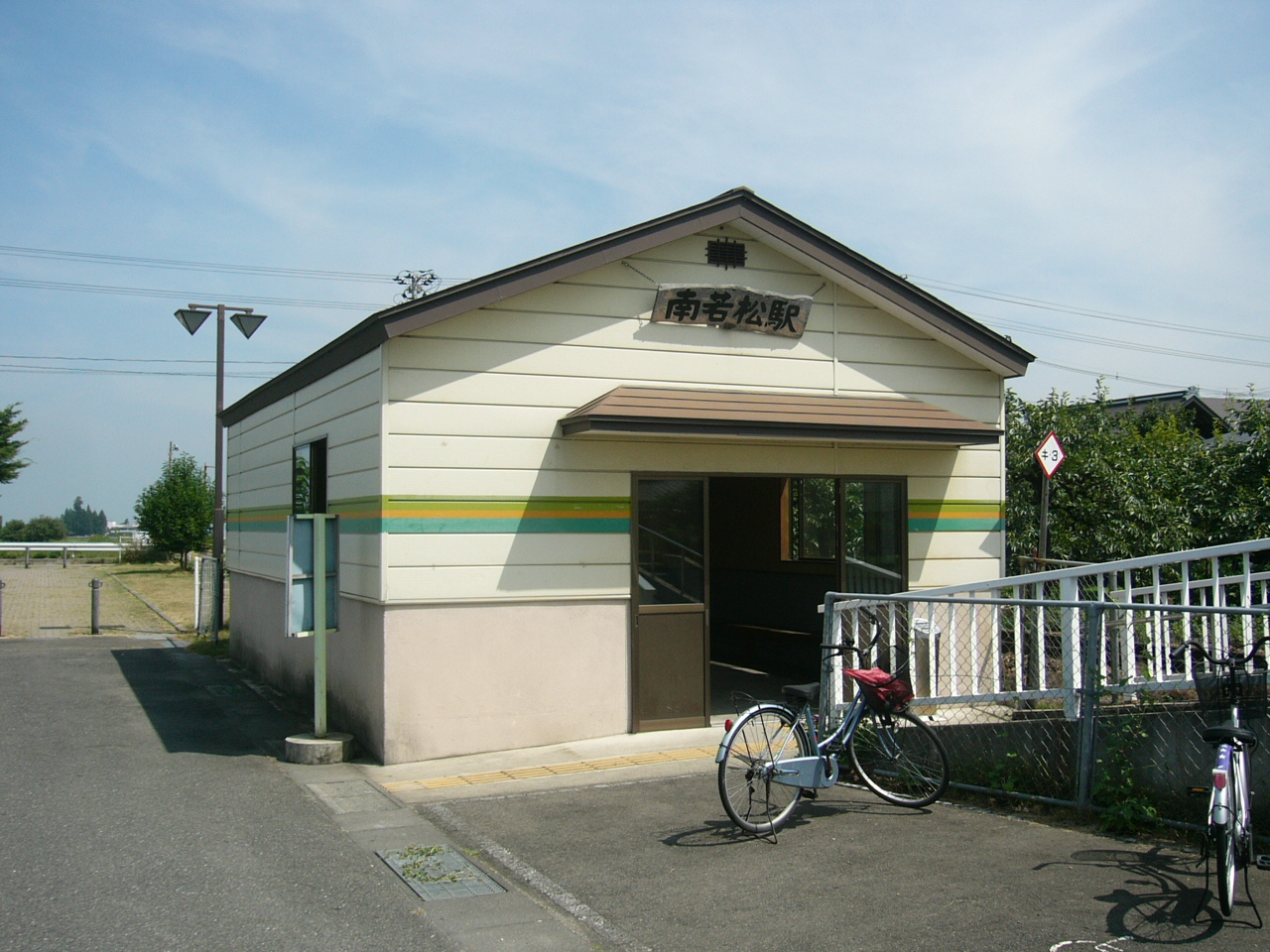 Minamiwakamatsu Station